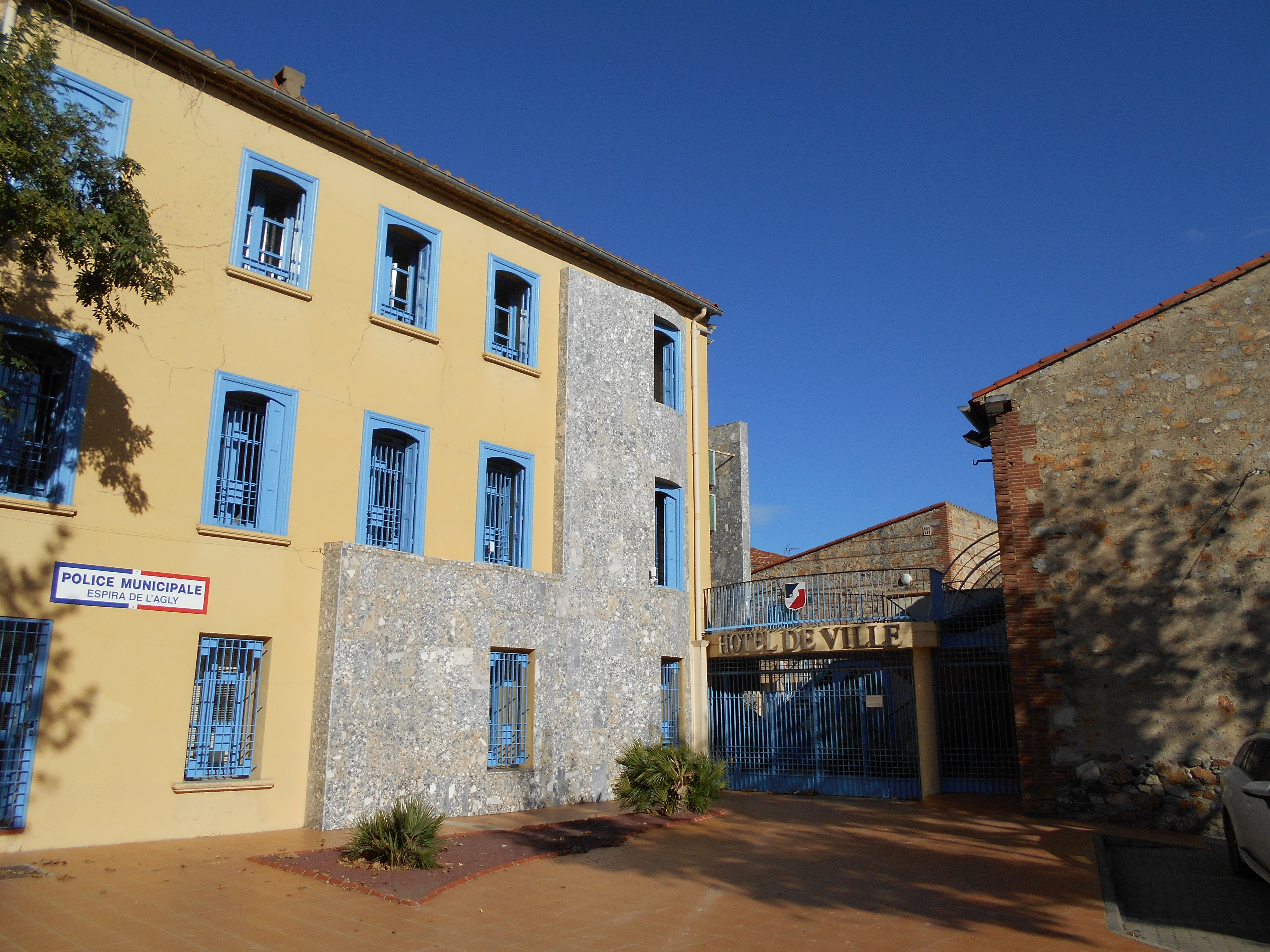 Casa de la vila d'Espirà de l'Aglí